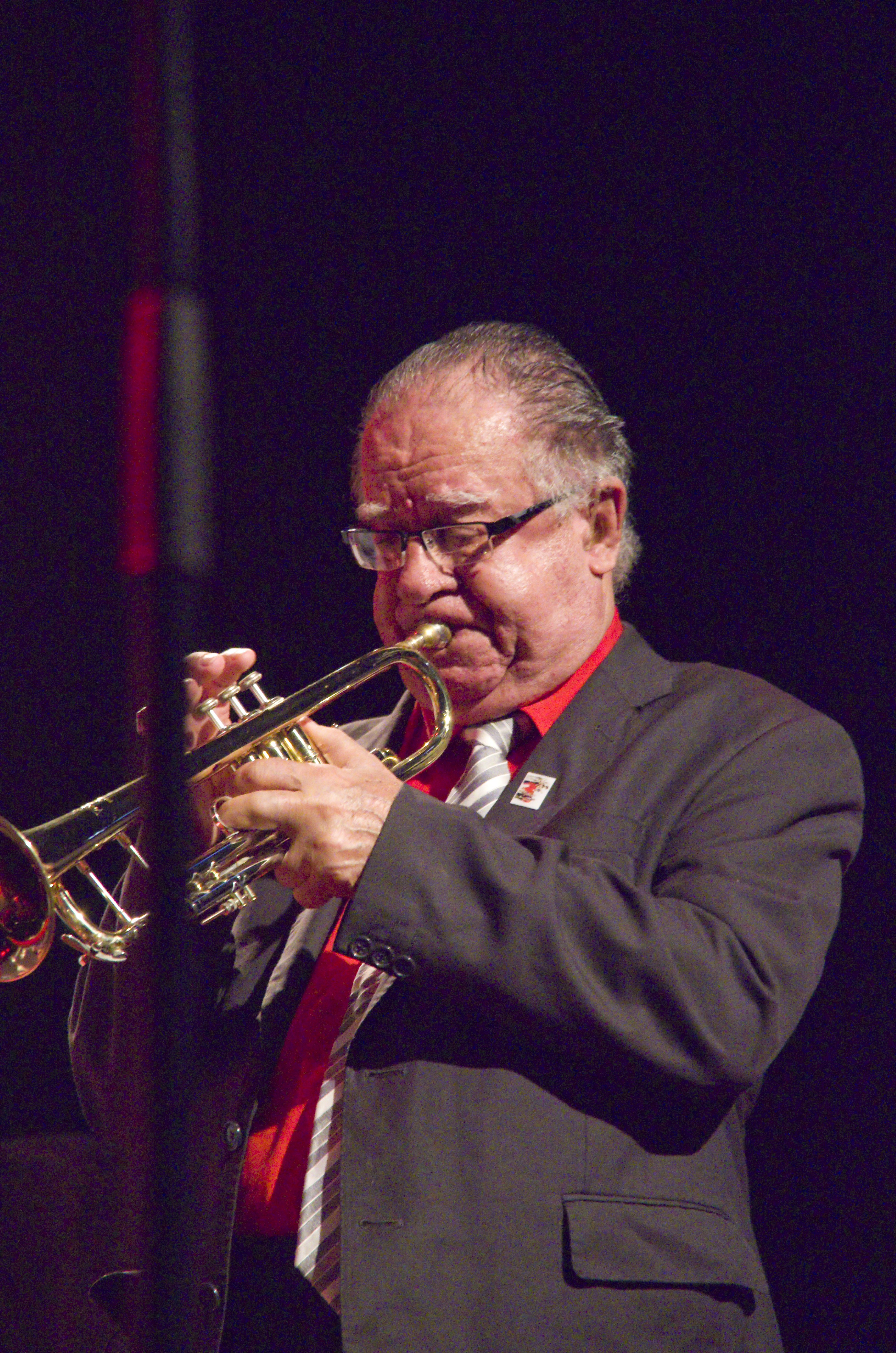 Das Zelt-Musik-Festival 2015 in Freiburg im Breisgau. 06.07.2015 Orquesta Buena Vista Social Club